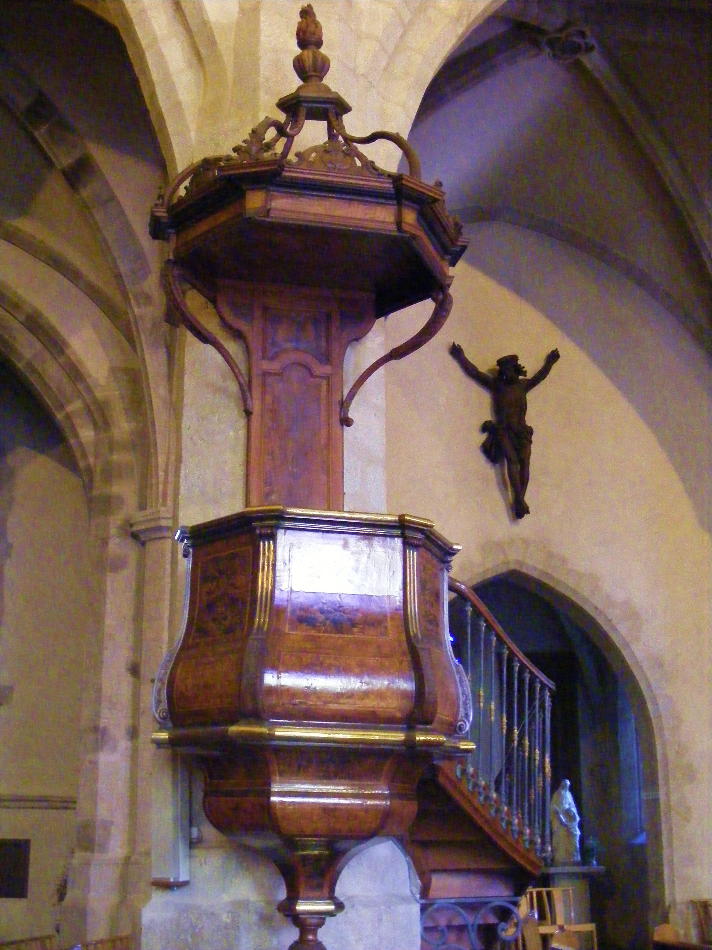 La chaire